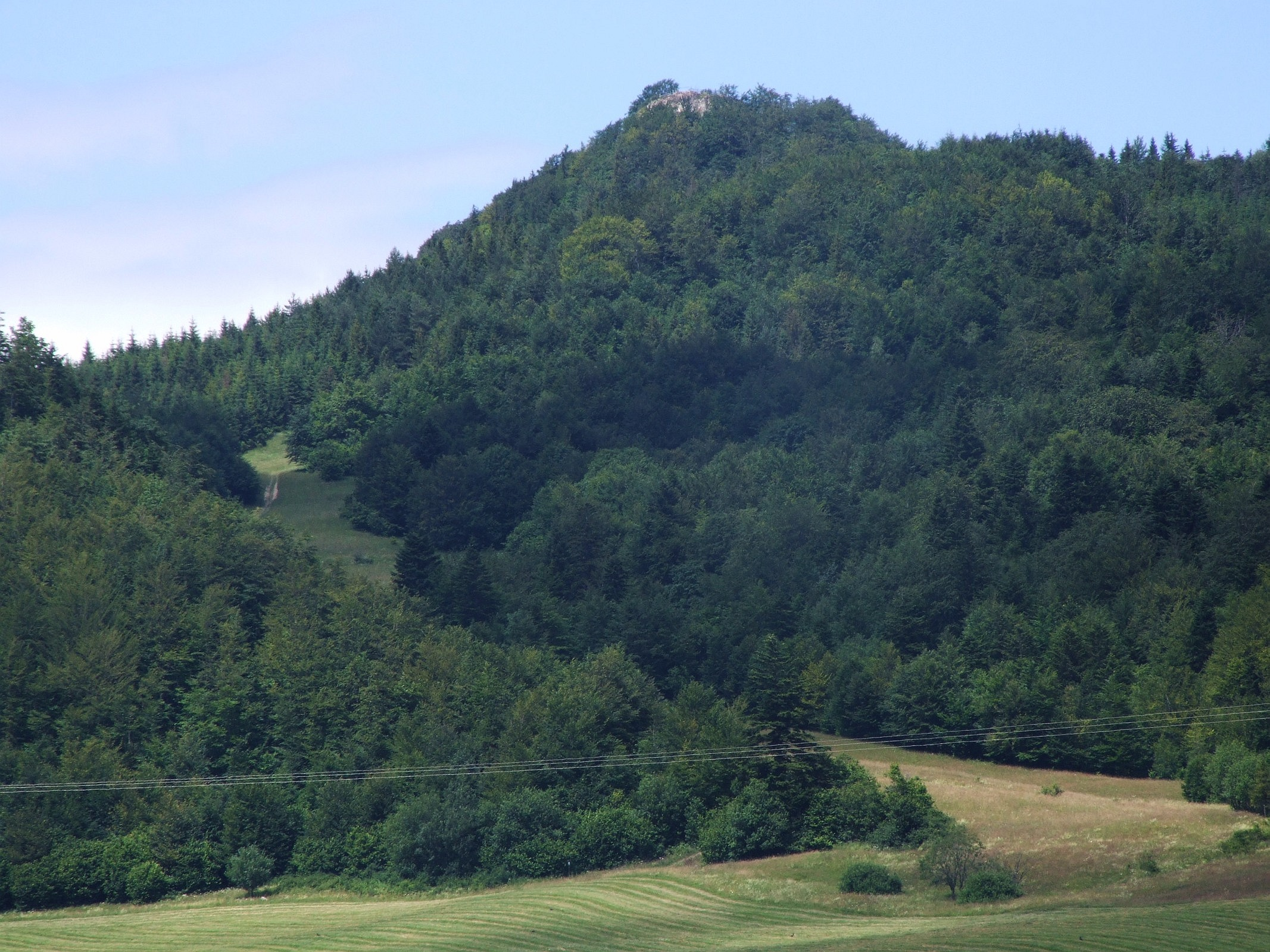 Wysoka, widok z południowej (słowackiej) strony